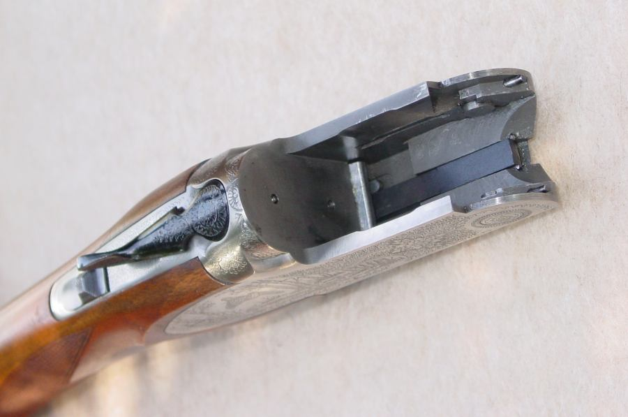 Basküle der BDF